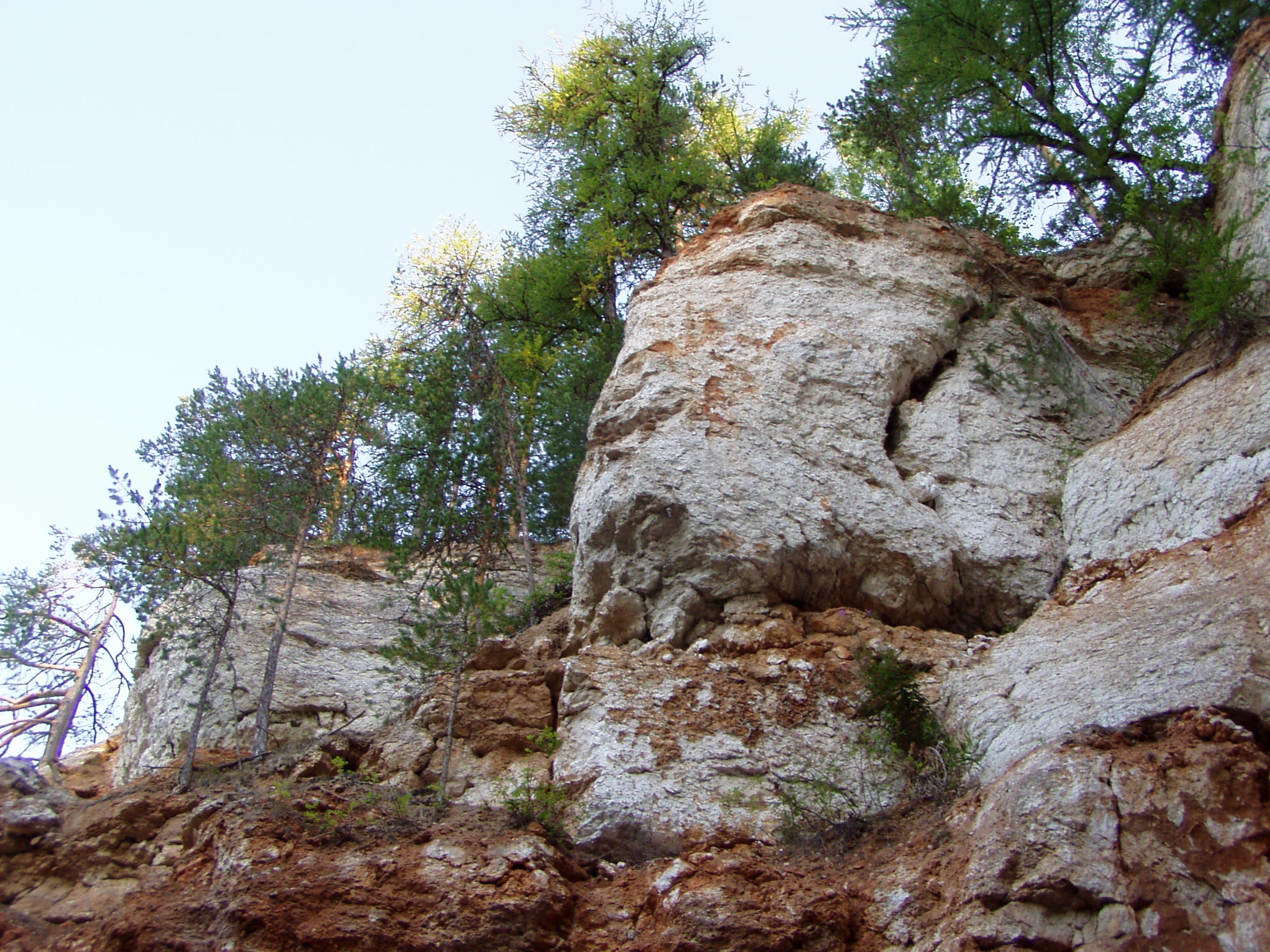 Пещера Голубинский провал, Пинежский заповедник